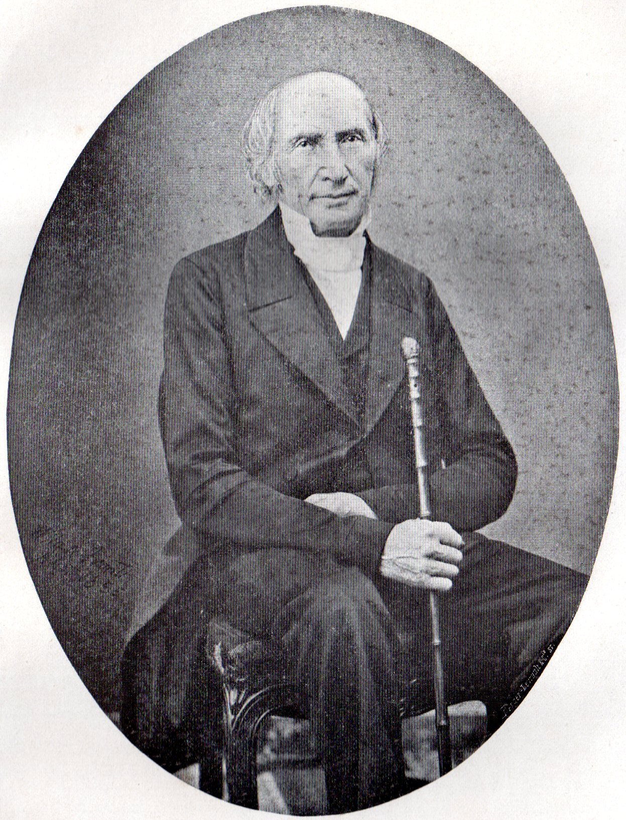 M. Henri Jaquet (1788-1867), pasteur et directeur de l’Institut protestant de Glay. Source : Edouard Favre, François Coillard : Enfance et jeunesse (tome 1), Société des Missions Evangéliques, Paris, 1908.